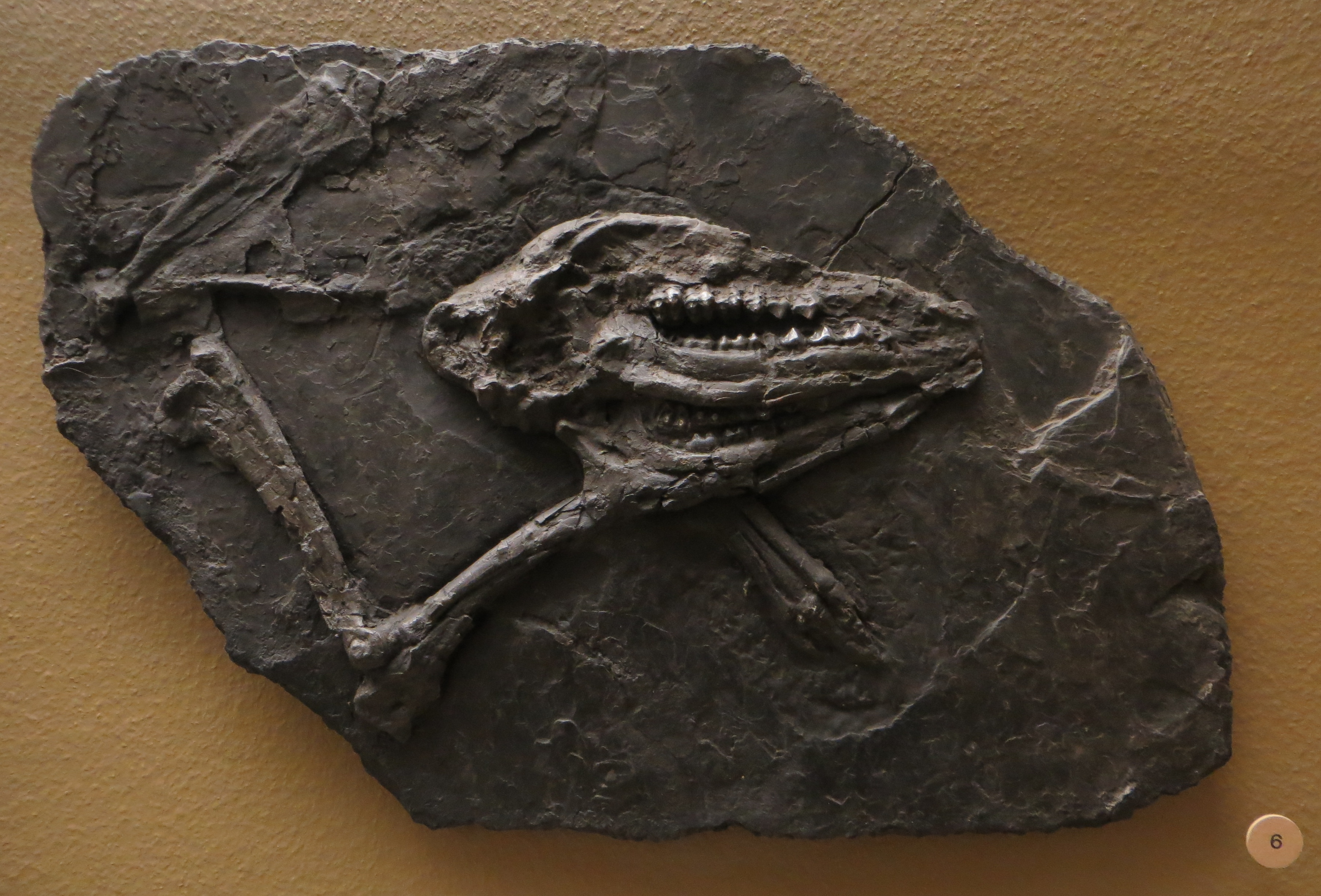 Fossil of Anthracotherium- Took the picture at Natural History Museum, Basel